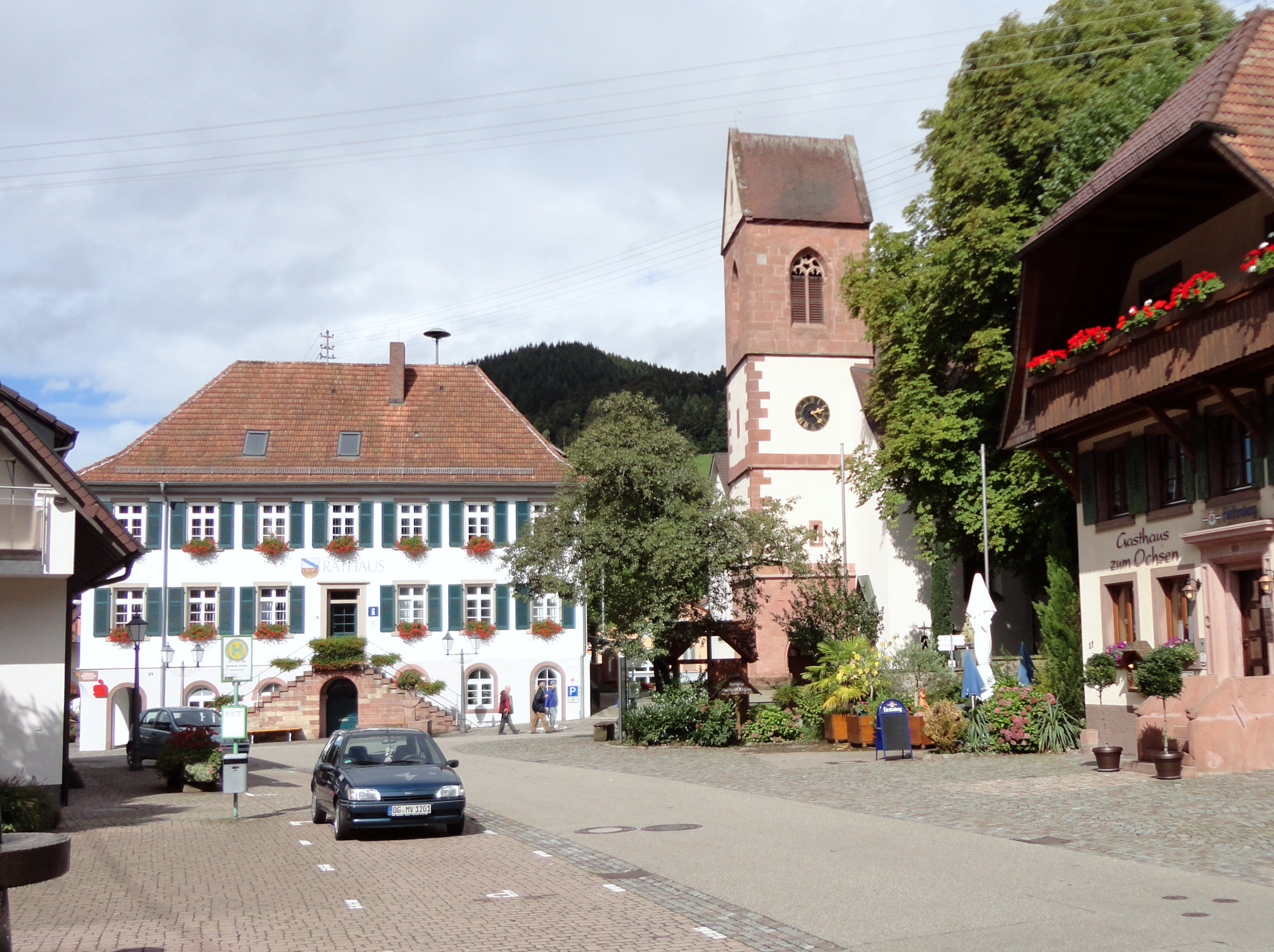 Das Rathaus und die katholische Kirche St. Afra in Mühlenbach (Schwarzwald)